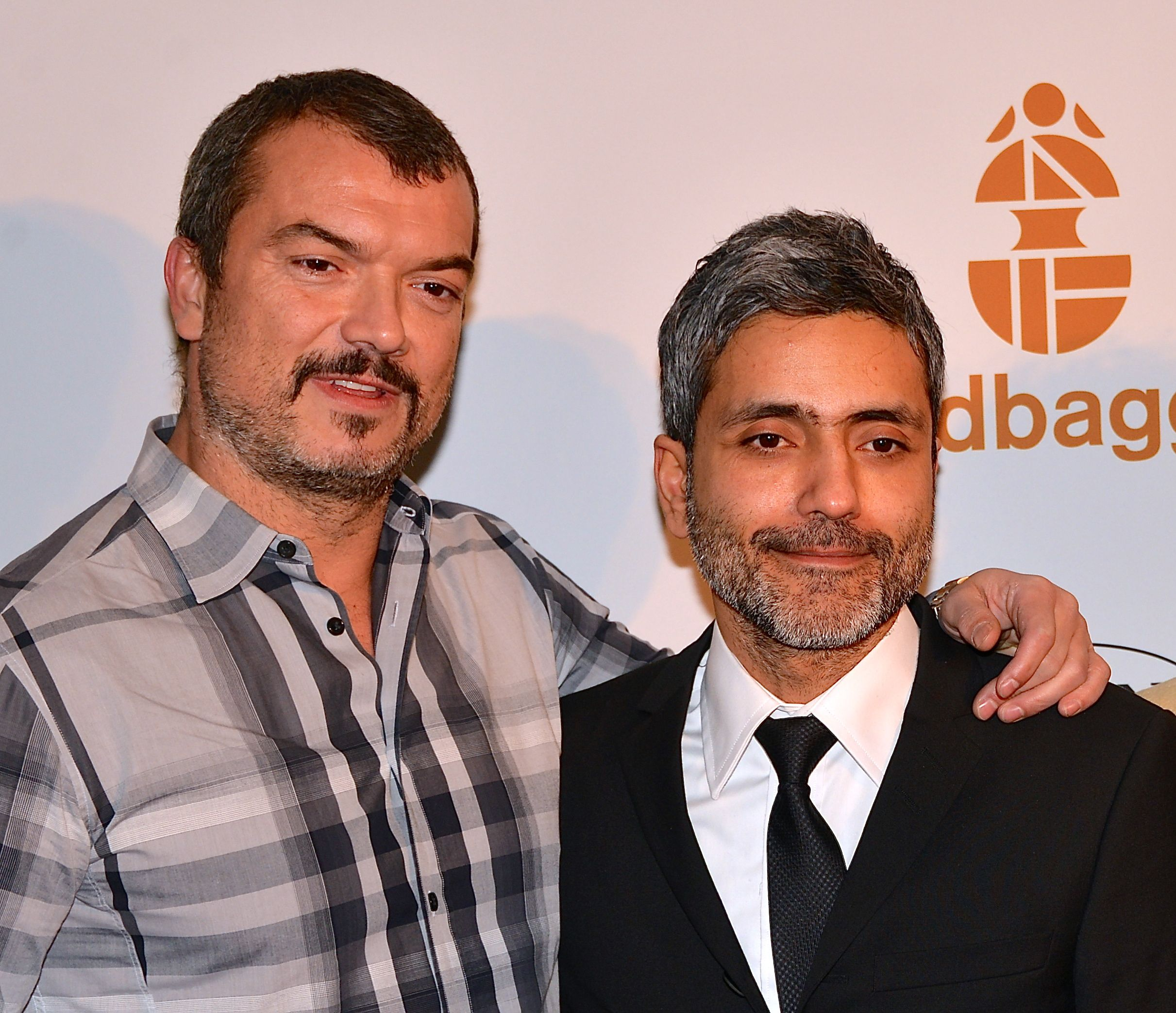 Dragomir Mrsic & Babak Najafi på Guldbaggegalan den 21 januari 2013.